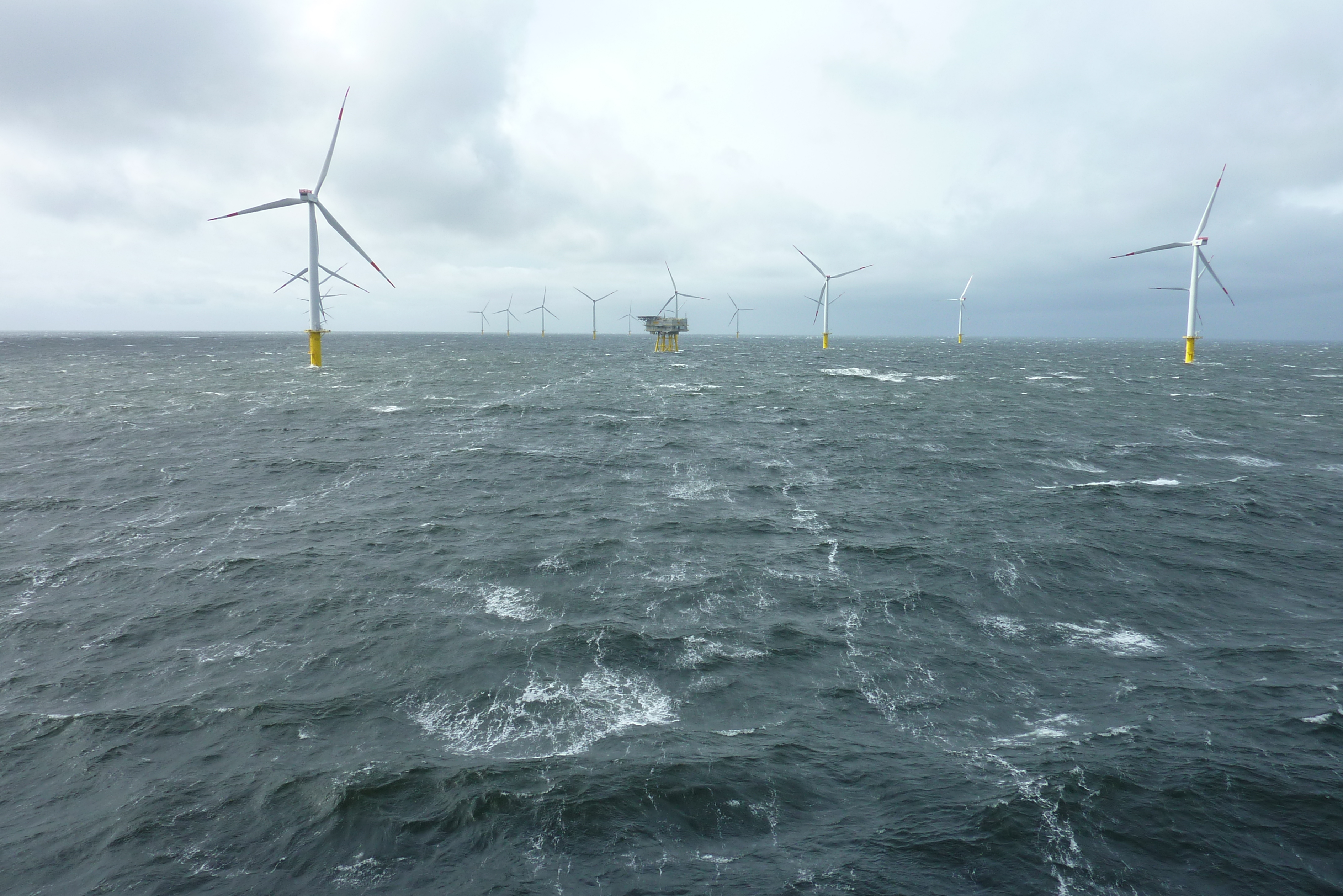 Offshore-Windpark Riffgat mit Umspannplattform (mittig)